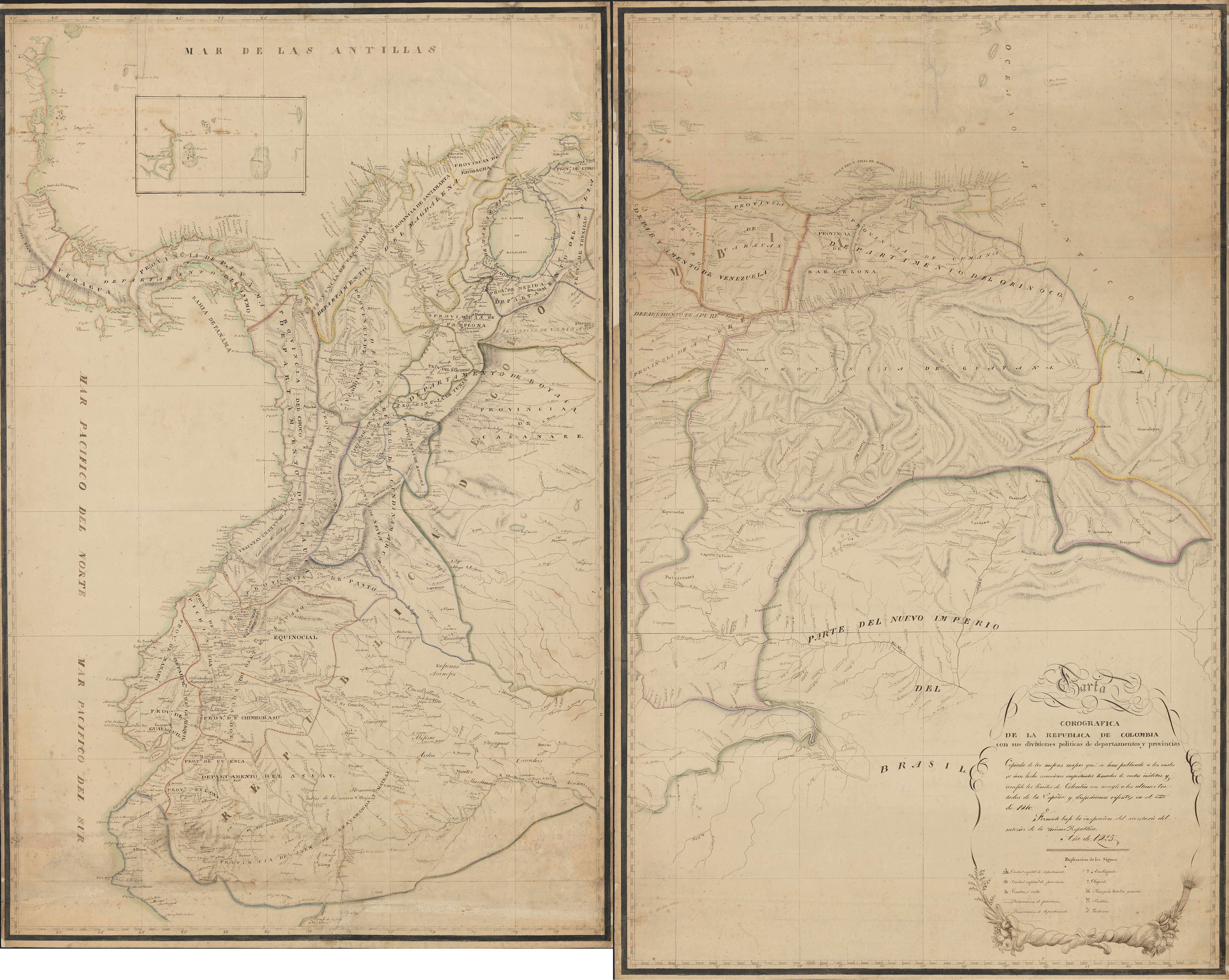 Carta Corográfica de Colombia de 1825, con la distribución territorial que ordenaba la ley de junio de 1824